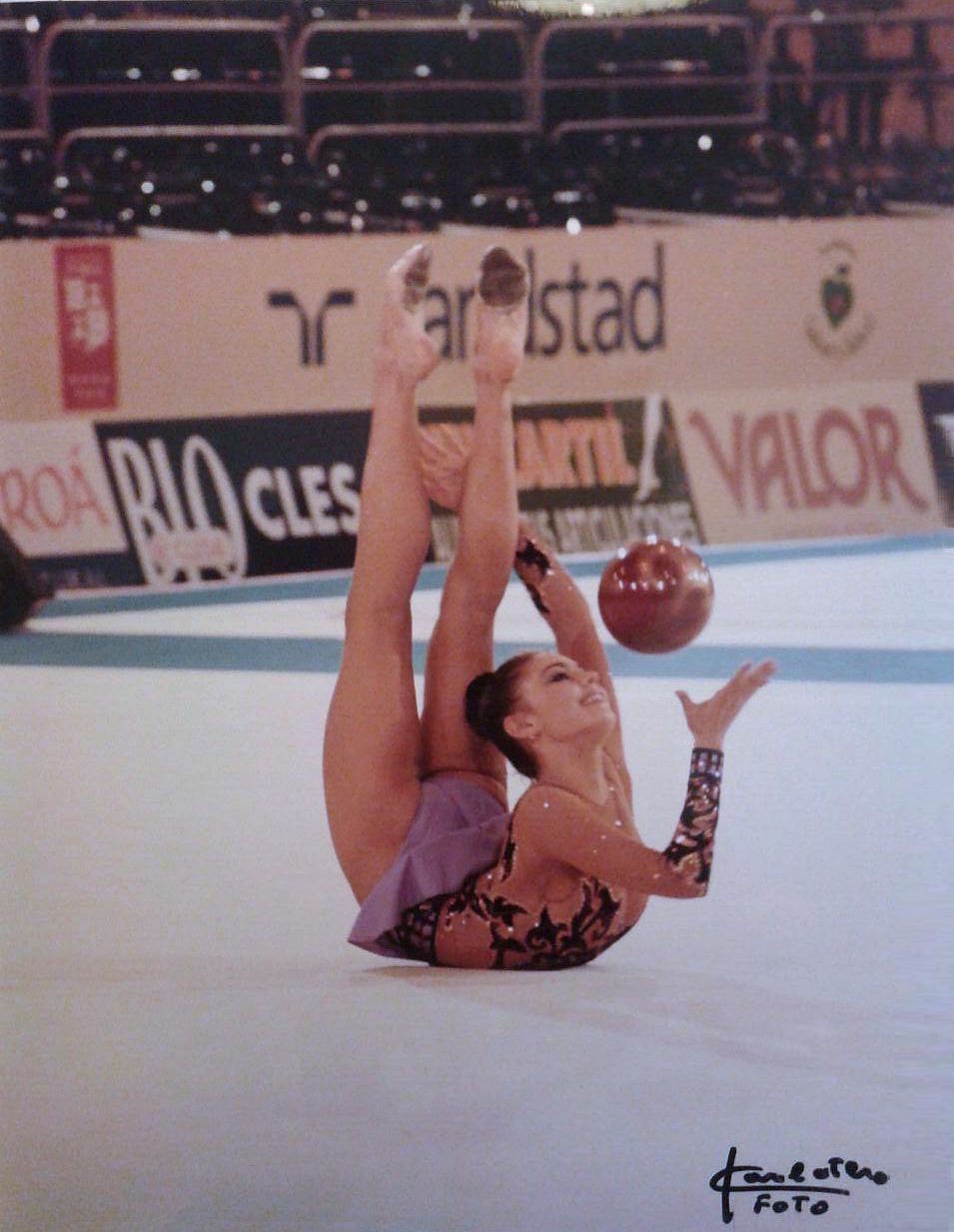 La gimnasta rusa Alina Kabáyeva en el Campeonato Mundial de Gimnasia Rítmica de Madrid en 2001.